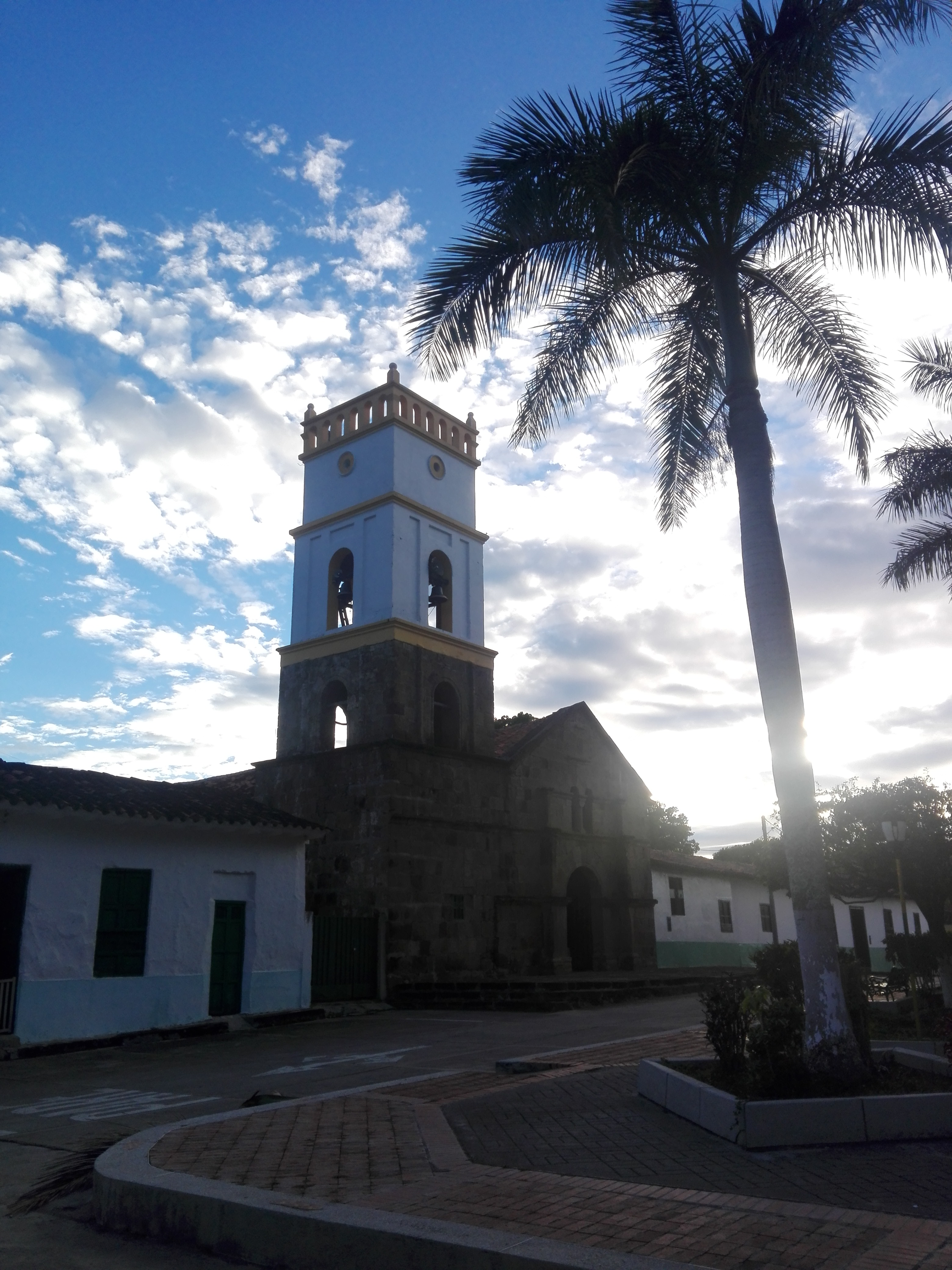 Este es un atardecer palmareño con un fondo natural.